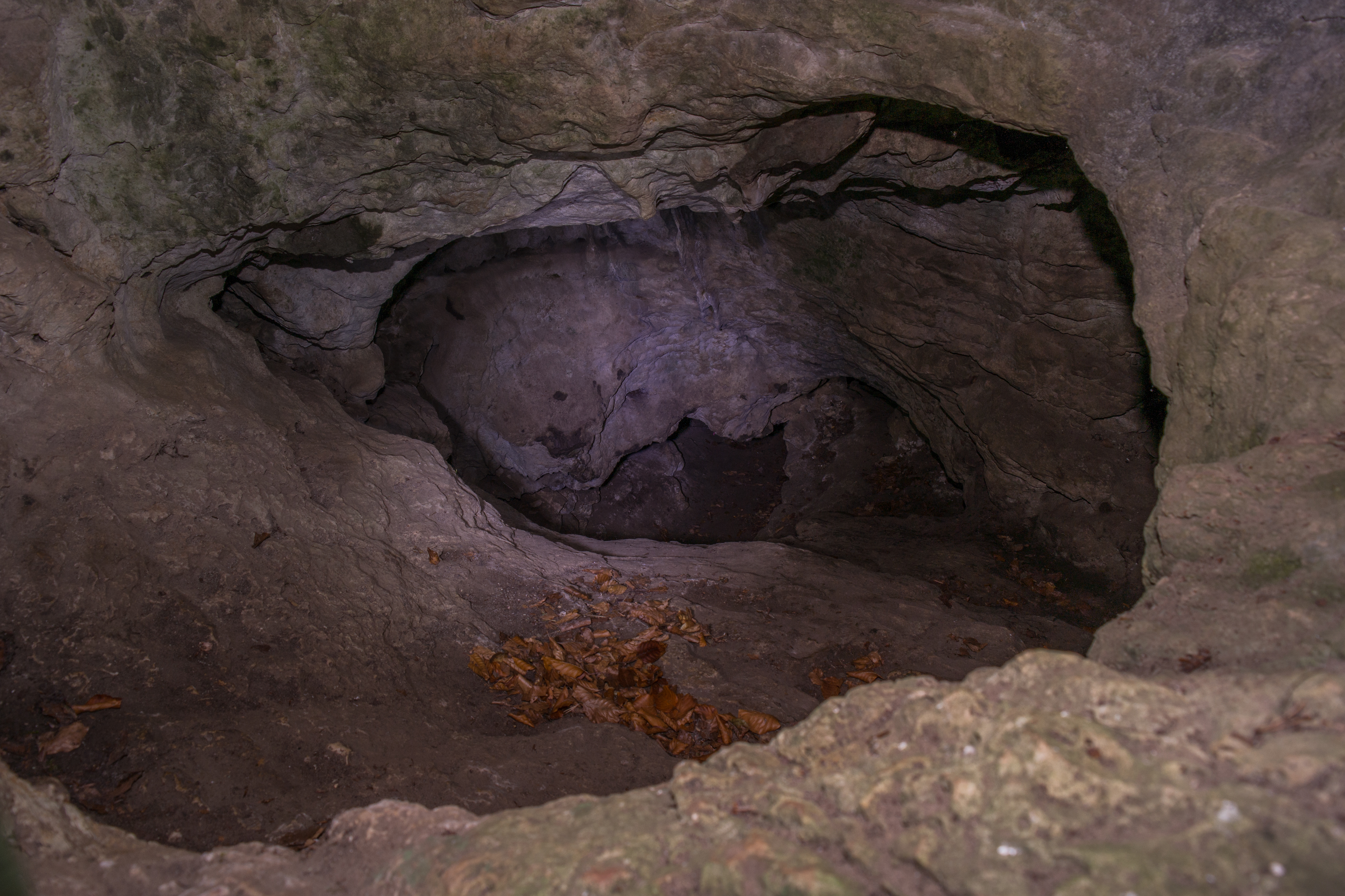 Blick in den Eingangsbereich der Höhle